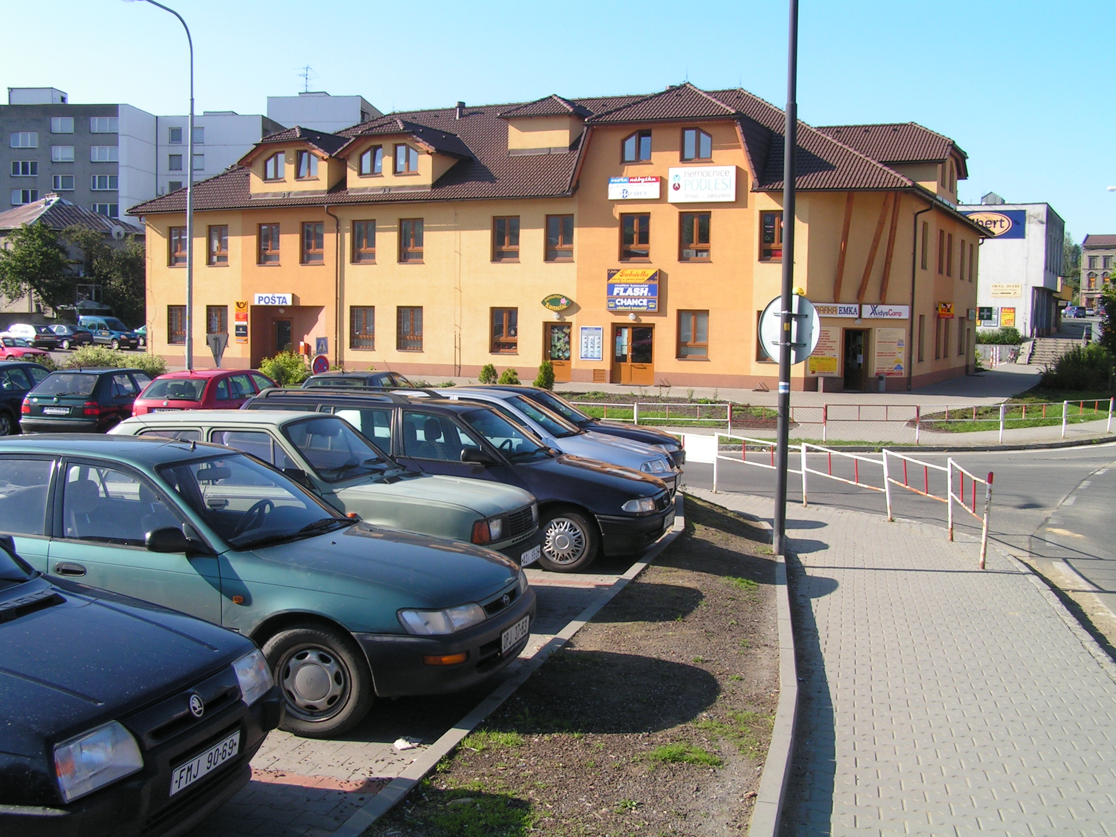 Post office in Jablunkov (Jabłonków)